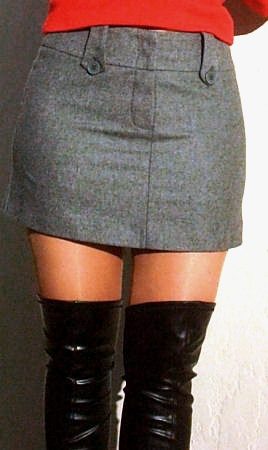 Miniskirt